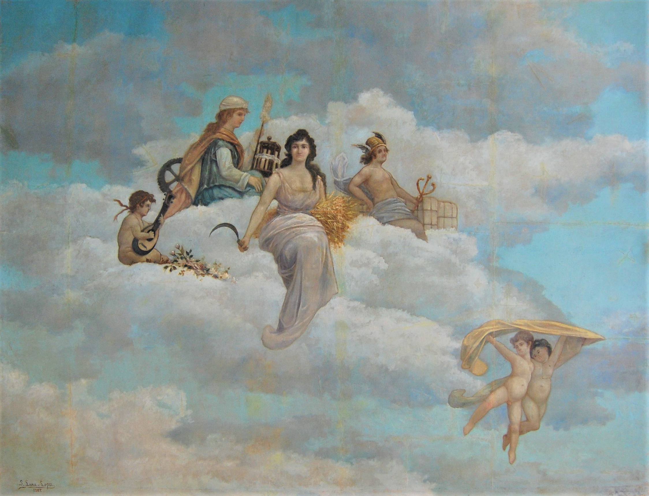 Fresco en el techo del salón de tapices del Círculo de Contribuyentes en Alcalá de Henares (Comunidad de Madrid - España). Pintado por Samuel Luna López, en 1907, en conmemoración del III Centenario de la publicación de la primera parte del Quijote. Representa, de izquierda a derecha, a Atenea (diosa de la industria) a Ceres (diosa de la agricultura) y a Hermes (dios del comercio).